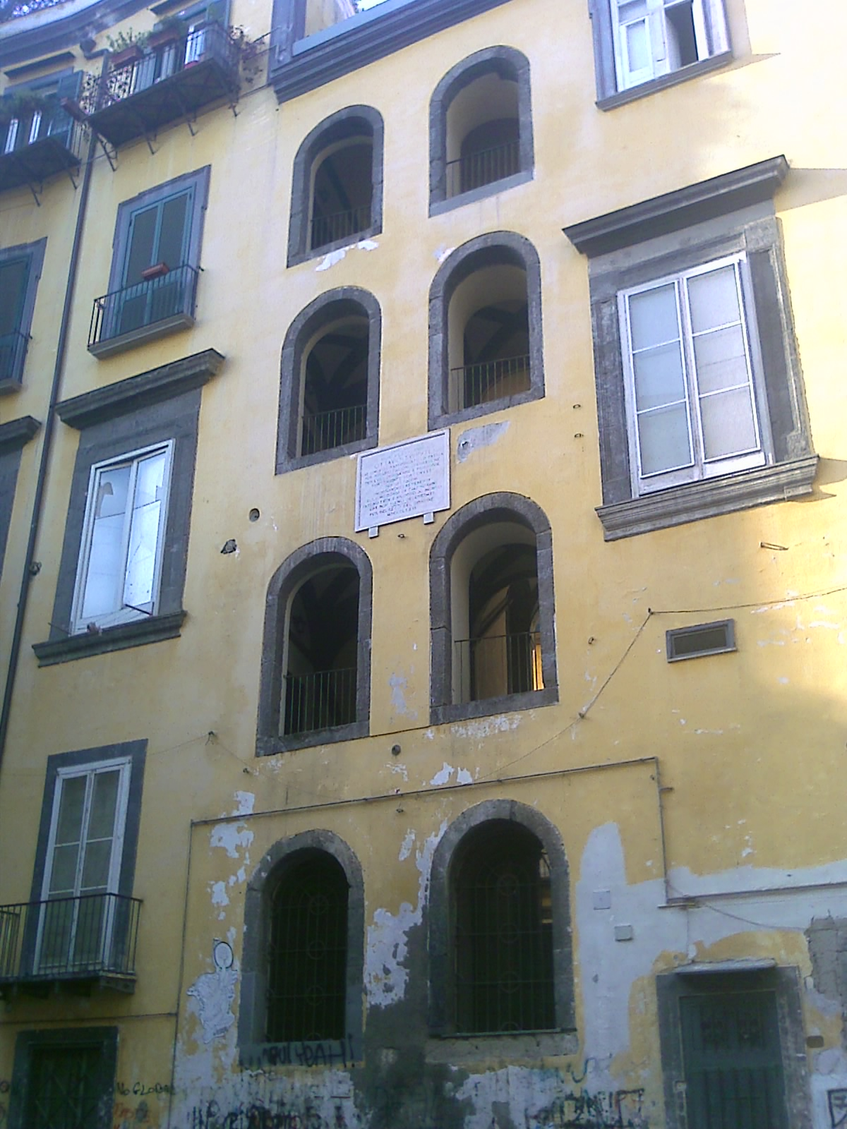 A lateral facade of Casamassima palace